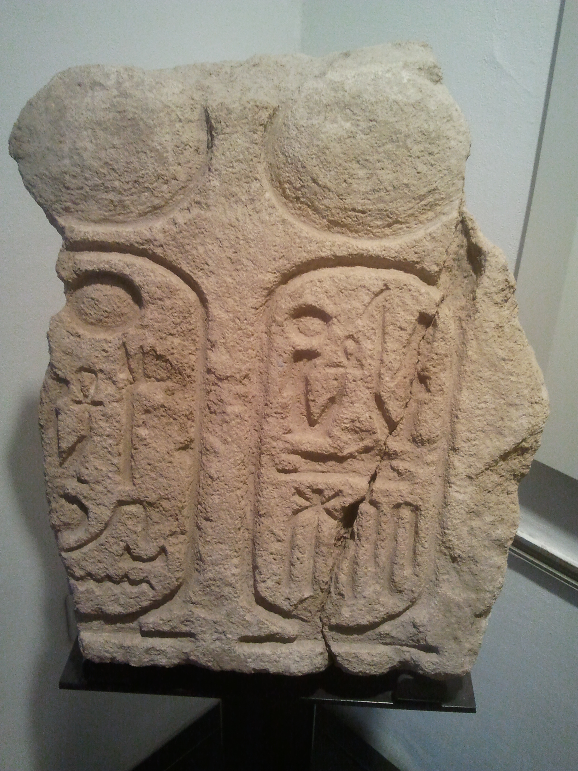 קרטוש בשני חלקים של רעמסס השני, מאבן גיר התגלתה מדרום לעזה שם הייתה כנראה קבועה במצודה מצרית על דרך הים. תצוגה מוזיאון הכט חיפה